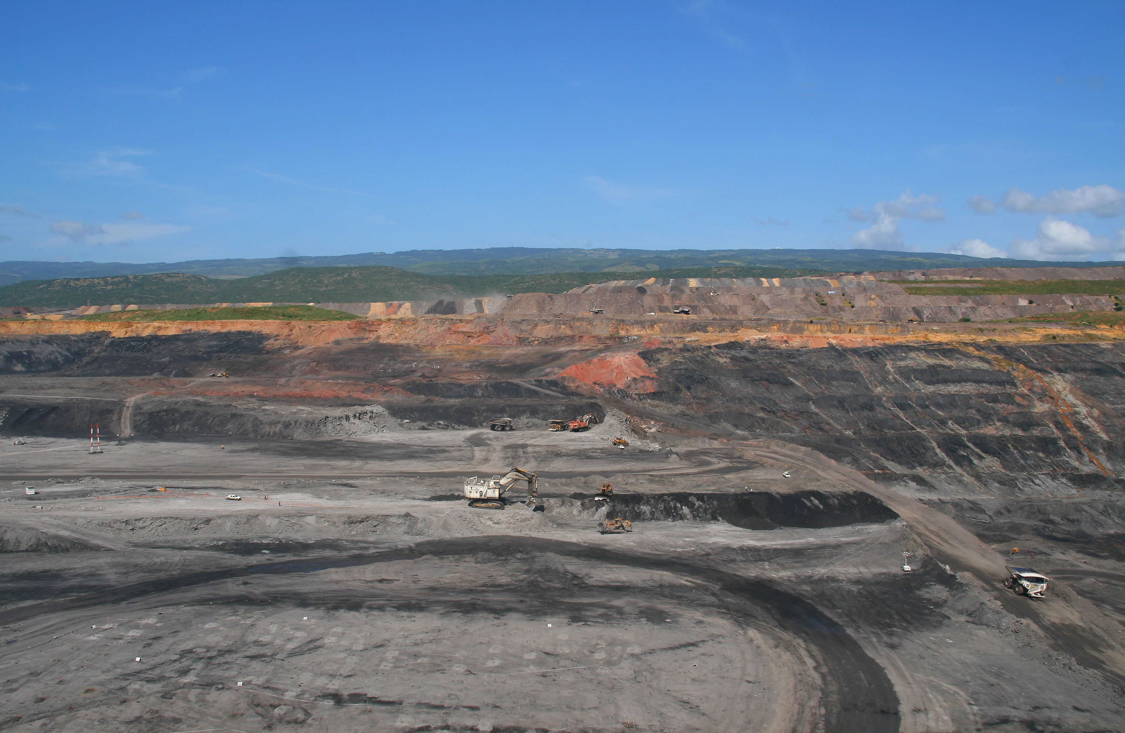 Coal mine, El Cerrejón